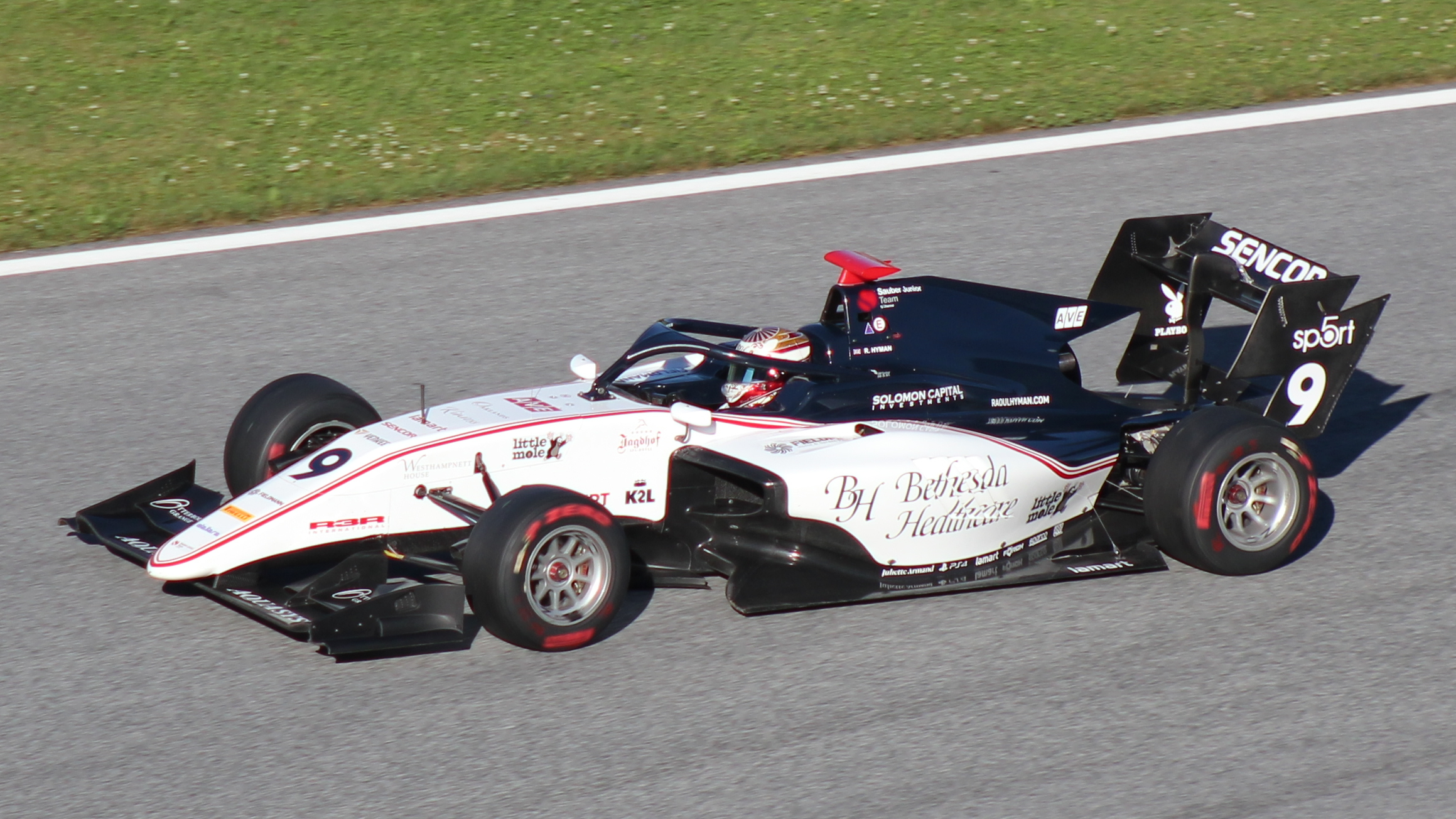 Hyman beim Rennwochenende in Österreich 2019